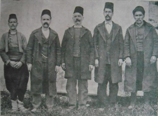 Освободени от Одринския затвор при Пашмаклийската афера в 1901 година българи от Райково.